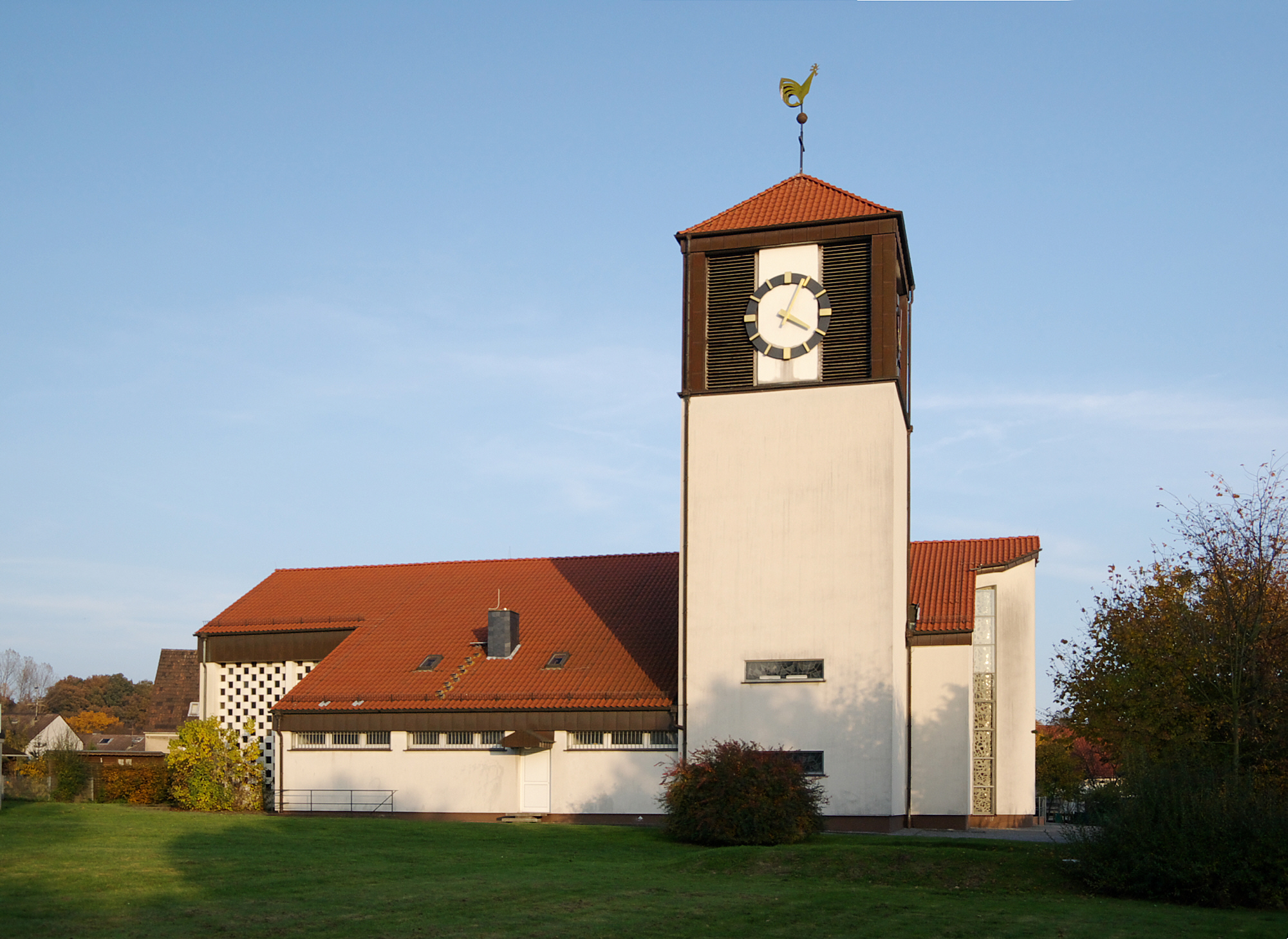 Katholische Kirche St. Konrad in Fröndenberg-Langschede, Nordrhein-Westfalen, Deutschland.